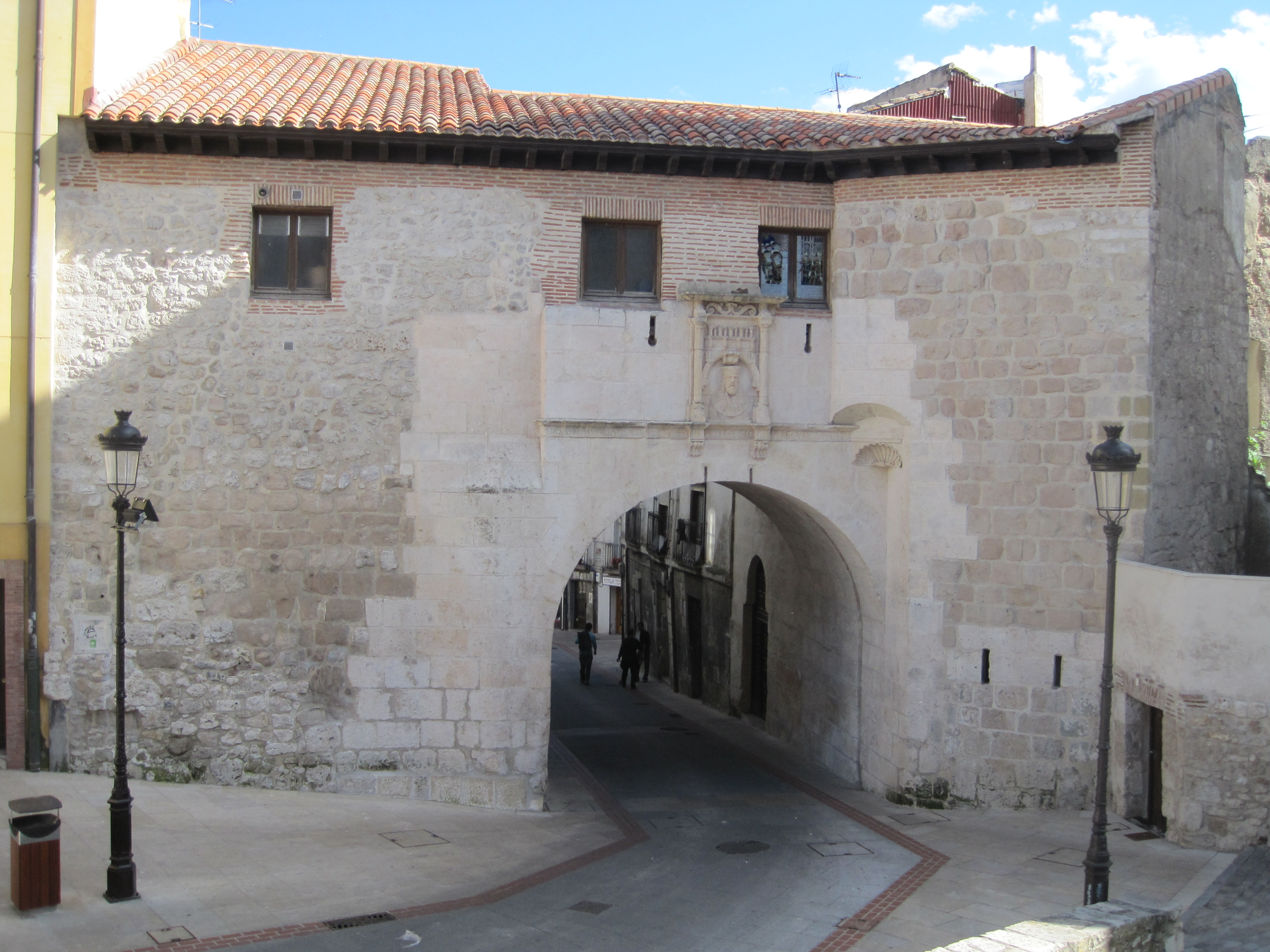 Arco de San Gil de Burgos.